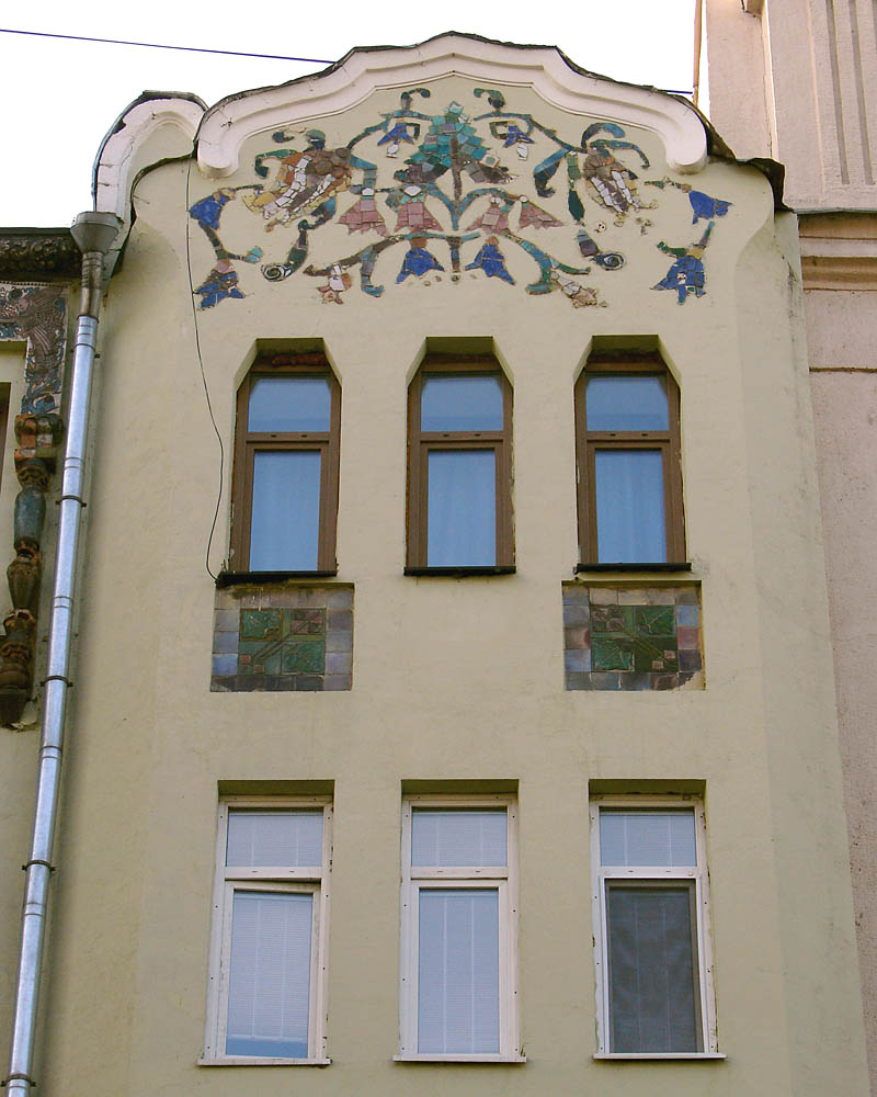 4-я Тверская-Ямская, 5. Дом постройки Эрнста Нирнзее, самая необычная его (?) работа. Шестиугольные окна - не московская деталь; кроме Нирнзее, её в Москве использовал только петербуржец Владимир Апышков Building by Ernst Nirnsee, Moscow, 4-th Tverskaya-Yamskaya Street. Hexagonal windows are very unusual for Moscow architecture (there are two buildings with them, the other by Vladimir Apyshkov).